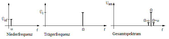 Amplituden aller Spektralfrequenzen